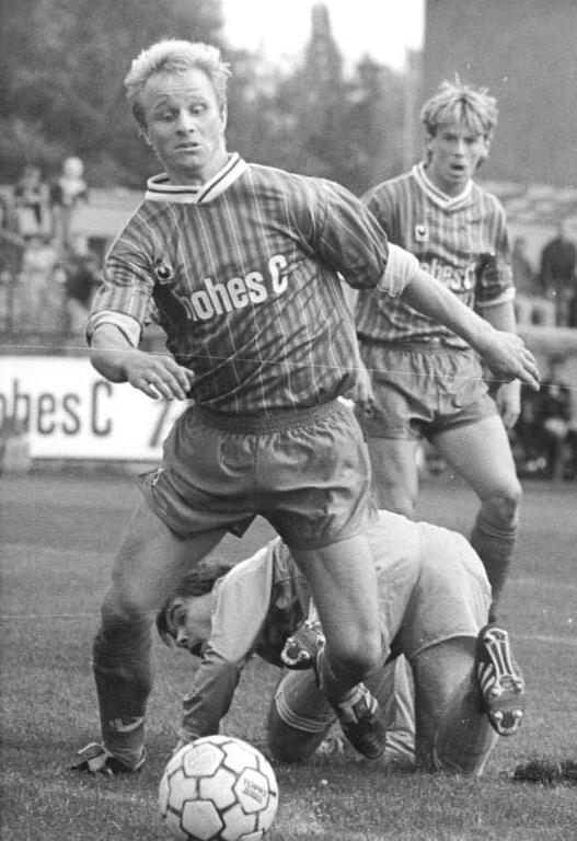 ADN-Friedrich Gahlbeck-29.9.90-Leipzig: Fußball-Oberliga-FC Sachsen Leipzig - FC Carl Zeiss Jena Dicke Luft vor dem Gehäuse der Gästemannschaft, das hier von Dieter Kühn angesteuert wird. Am Ende gab es bei diesem Spiel überhaupt kein sportliches Ergebnis - es wurde 10 Minuten vor Schluß wegen Zuschauerrandale abgebrochen.